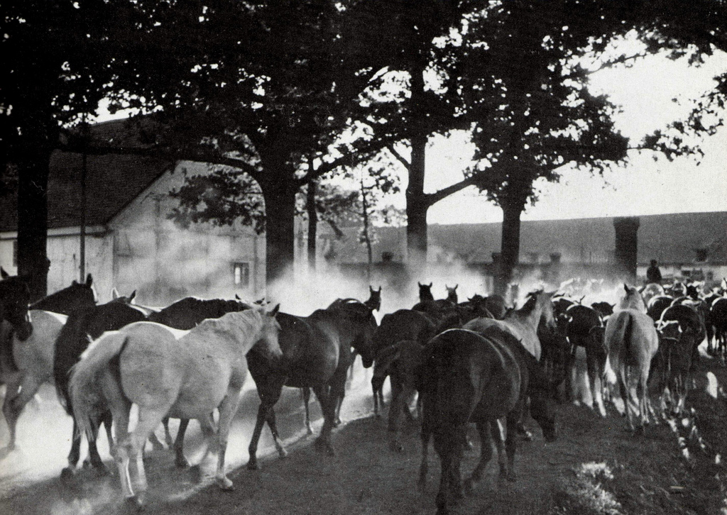 Das Gestüt in Trakehnen, Ostpreußen